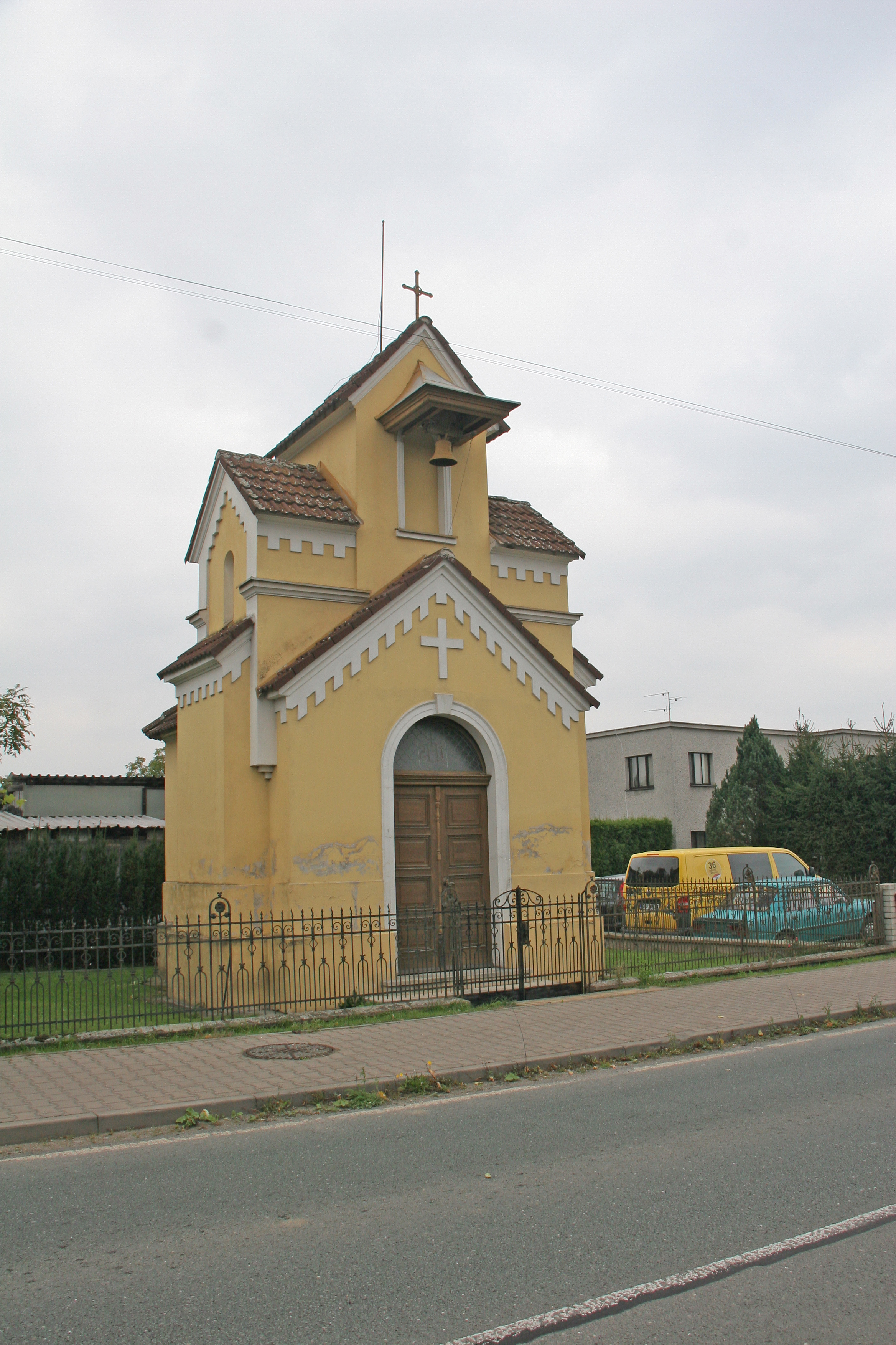 Blešno, kaple Srdce Ježíšova (čp. 115?).